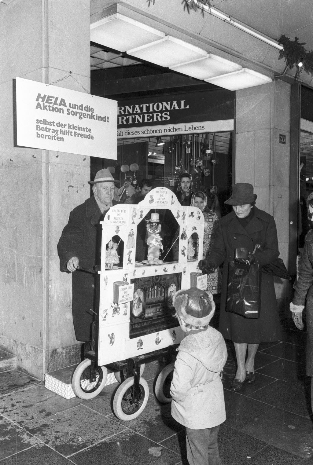 In der Holstenstraße 28-30 macht die Firma Hettlage & Lampe mit einem Leierkastenmann auf die Aktion aufmerksam. Das Schild darüber wirbt "HELA und die /Aktion Sorgenkind! /selbst der kleinste /Betrag hilft Freude /bereiten".